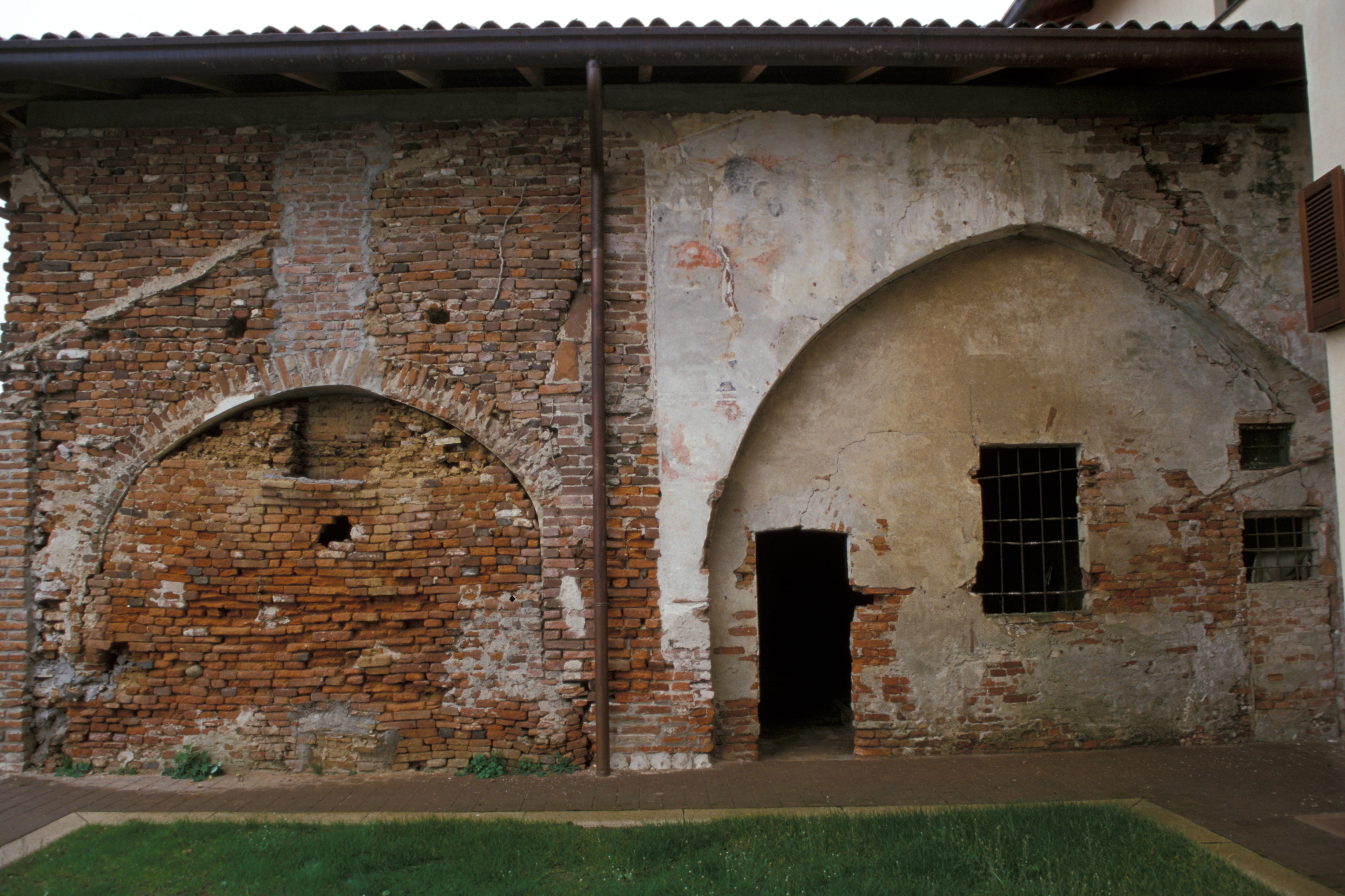 facciata esterna prima del restauro